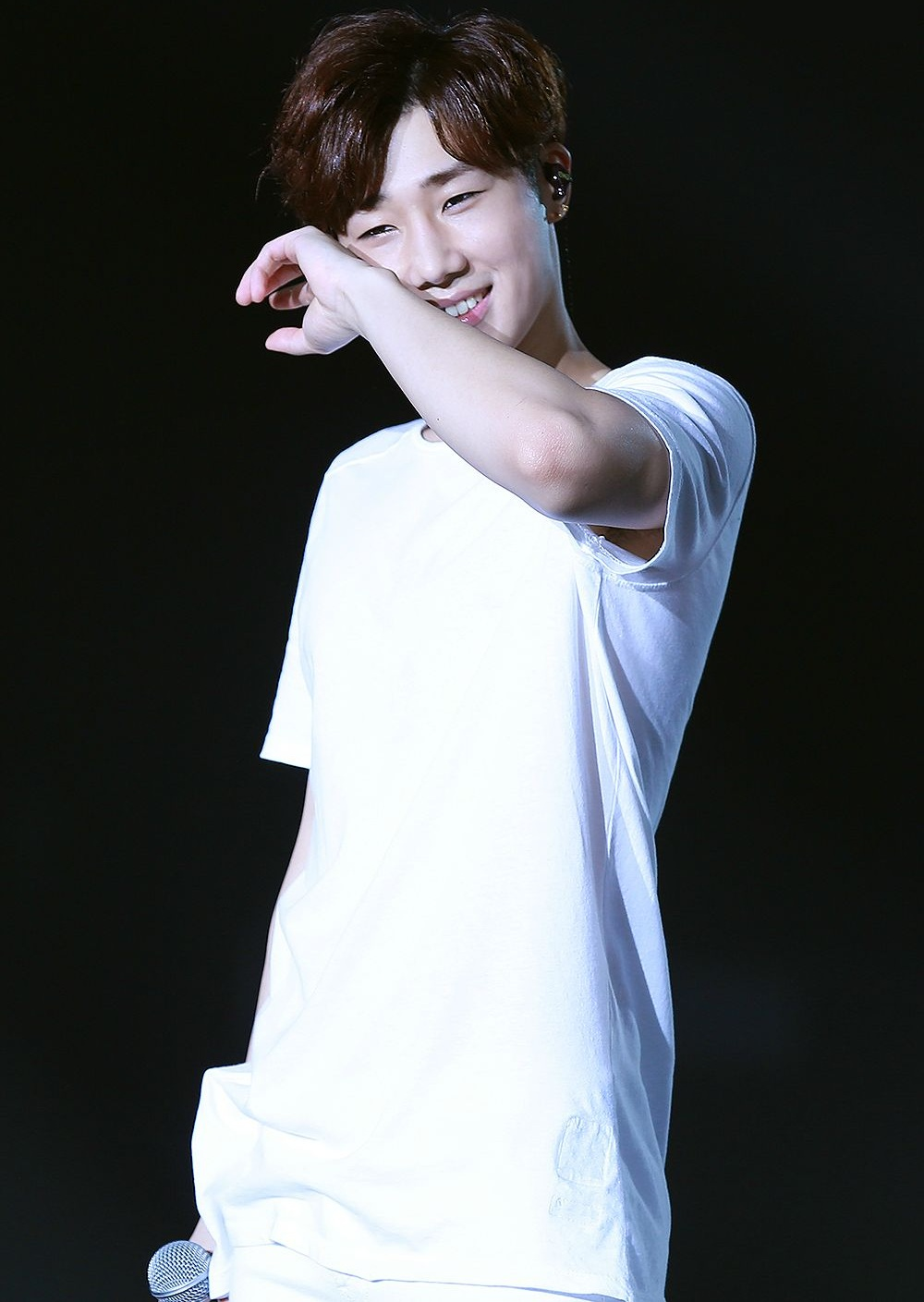 Sungkyu en INFINITE: Japan Tour 'Dilemma' in Nayoga el 11.03.2015